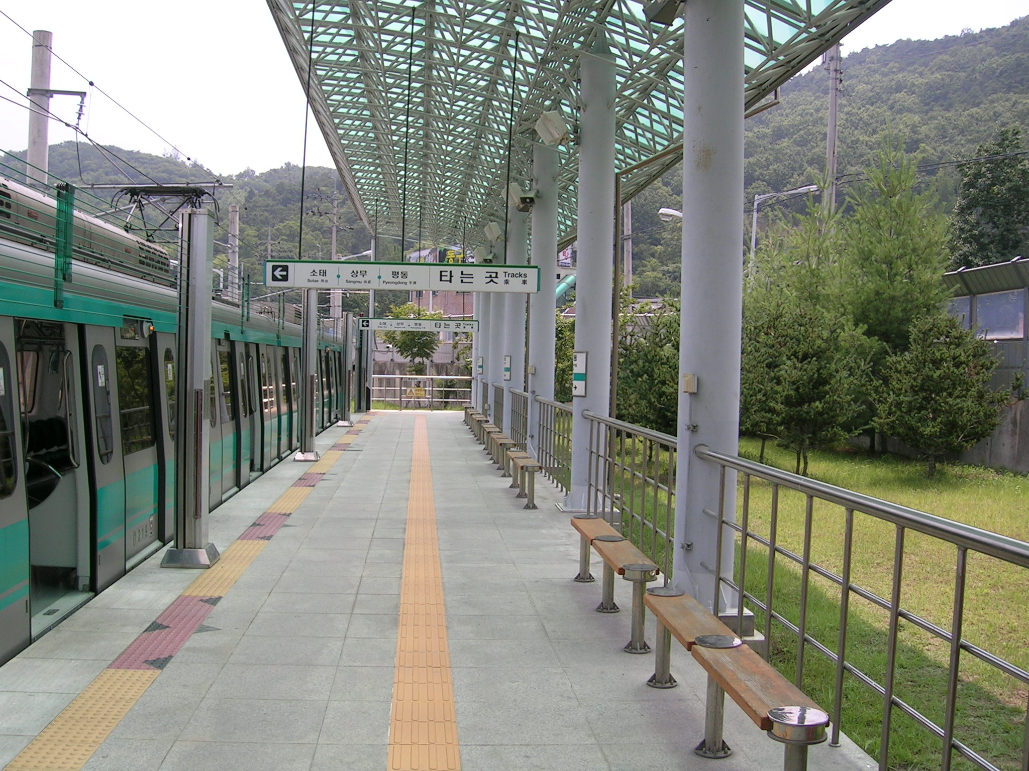 녹동역